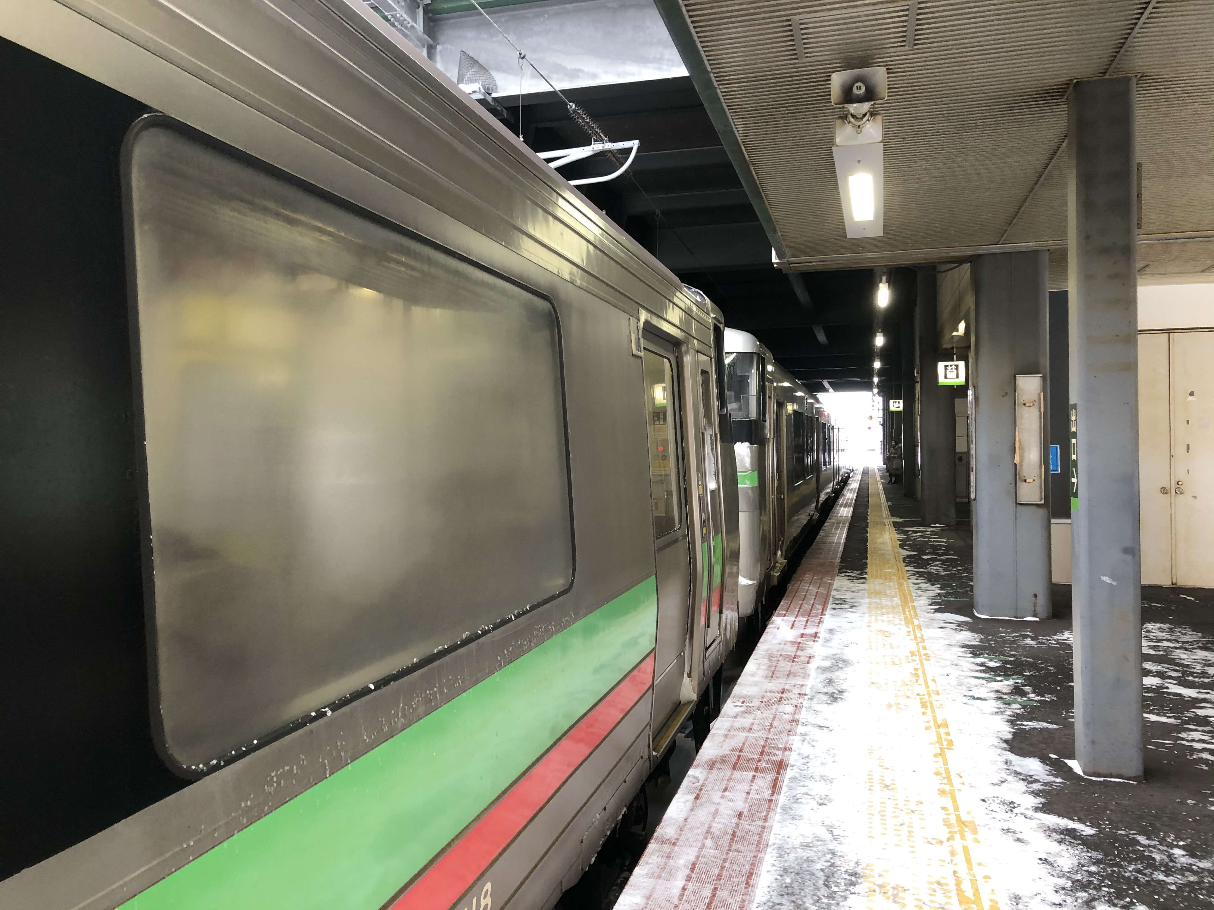 731系電車と735系電車が併結した普通列車（2020年2月10日、手稲駅にて撮影）